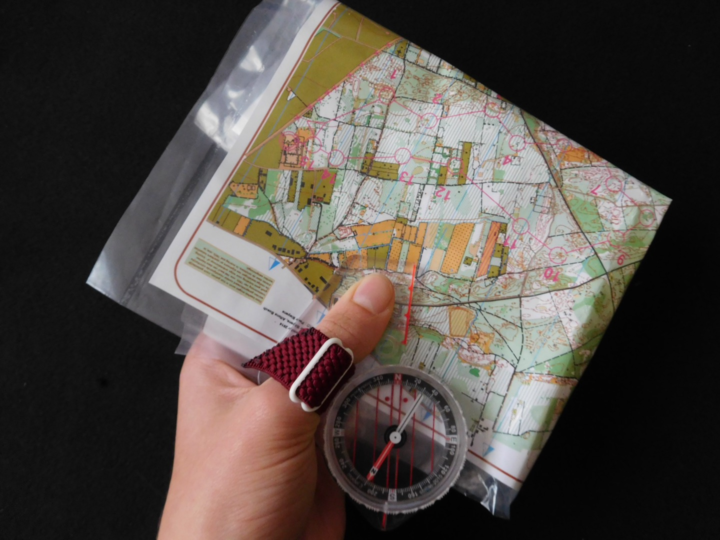 Zo houd je een duimkompas vast met een kaart. Je oriënteert je kaart volgens de naald die het noorden aanduidt.